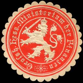 Sealing stamp Title: Grossherzoglich Hessische Ministerium der Finanzen Description: rot, weiß, geprägt Place: Darmstadt size: 4 cm